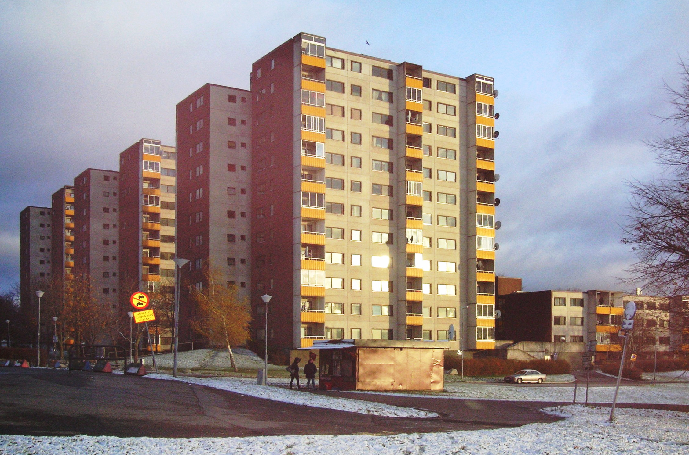 Fittja, Botkyrka